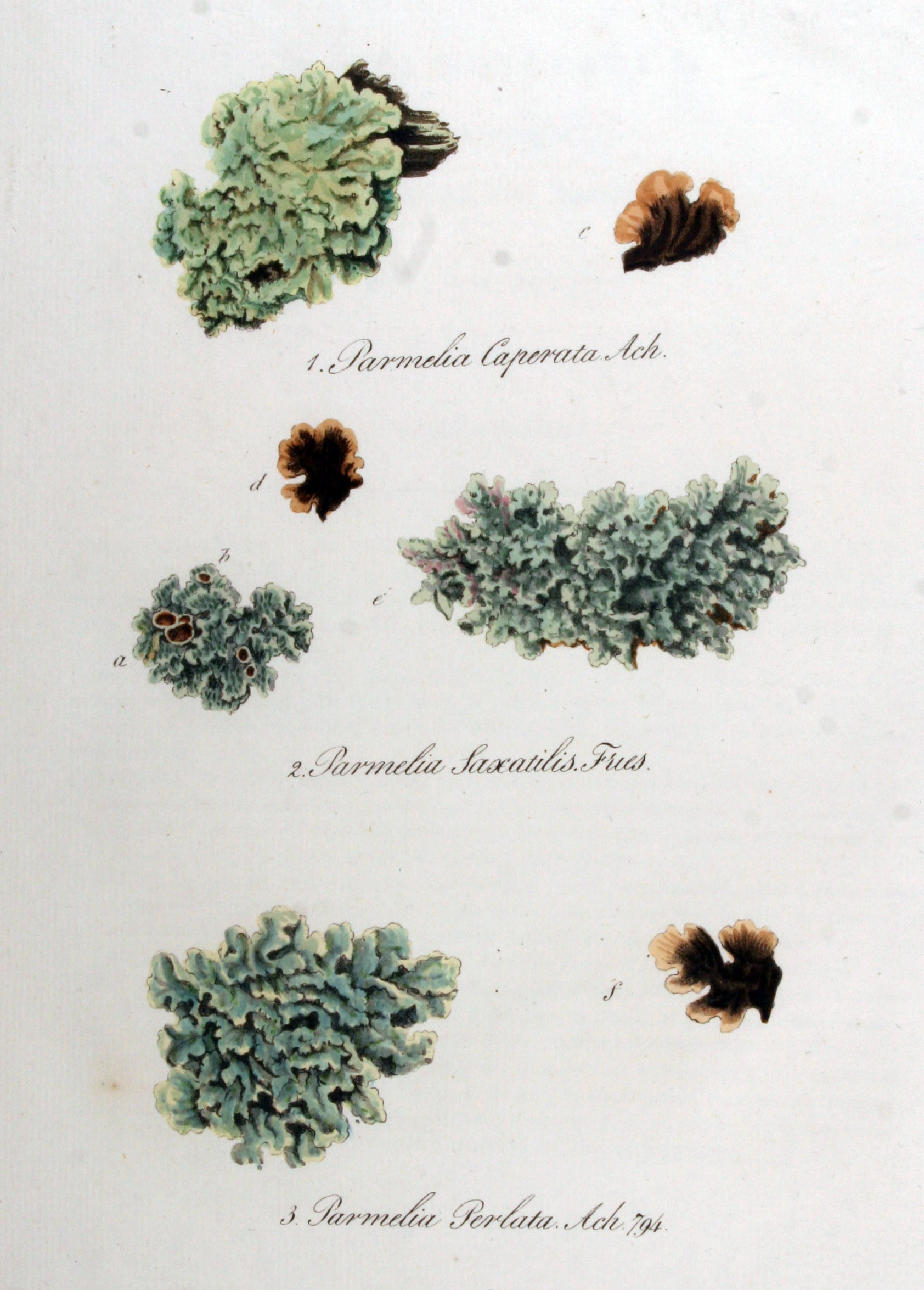 1. Flavoparmelia caperata (Linnaeus) Hale 1986, syn. Parmelia caperata (Linnaeus) Acharius 1803 2. Parmelia saxatilis (Linnaeus) Acharius 1803 3. Parmelia perlata (Hudson) Acharius 1803